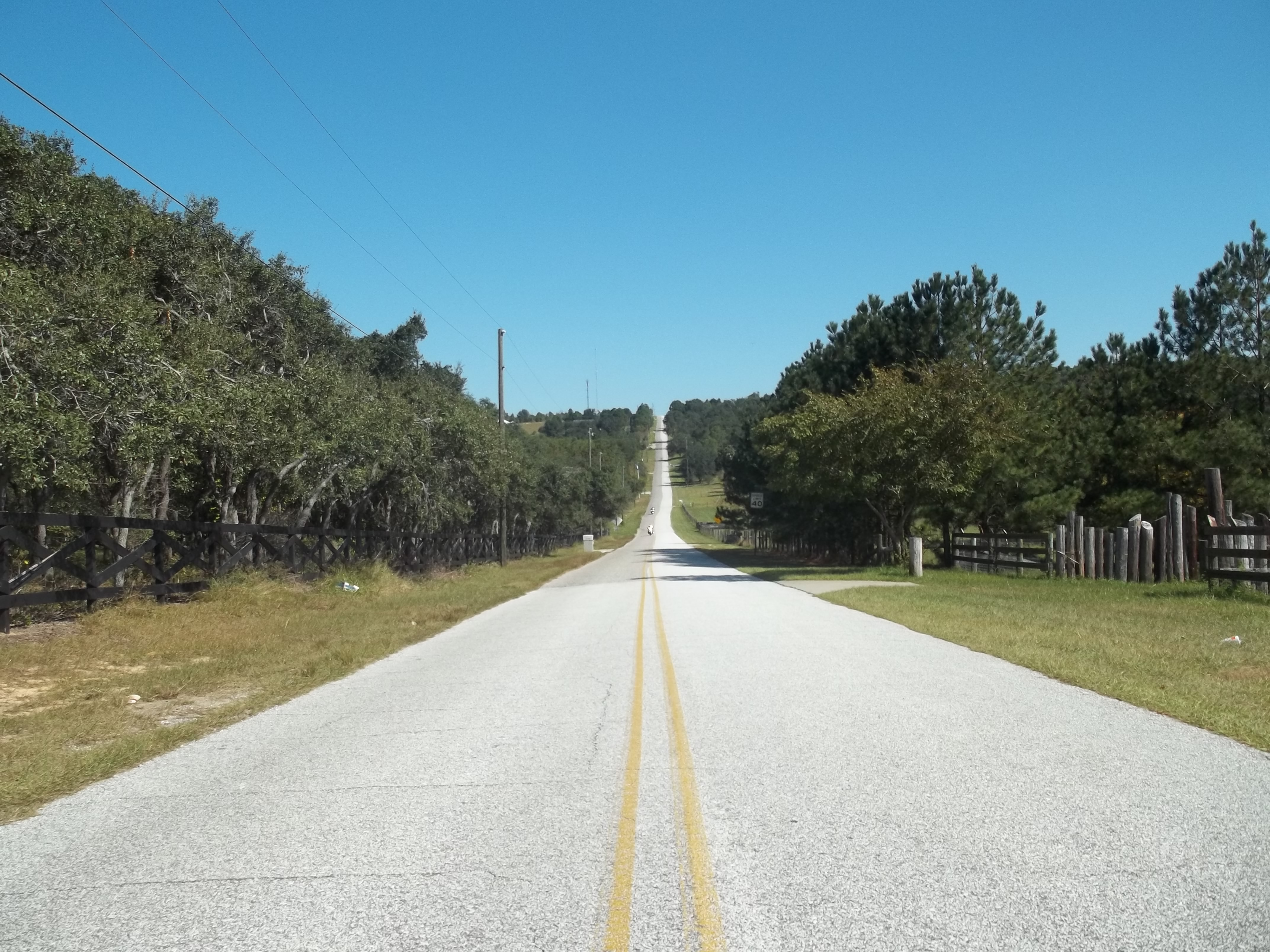 Ferndale, Florida: Sugarloaf Mountain (Florida)